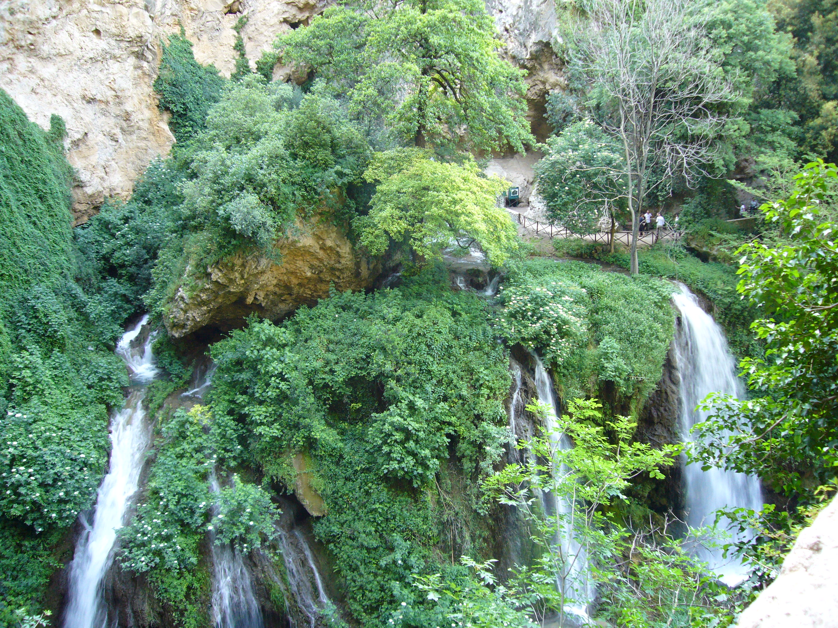 Tivoli, Villa Gregoriana: cascatelle alla Grotta di Nettuno